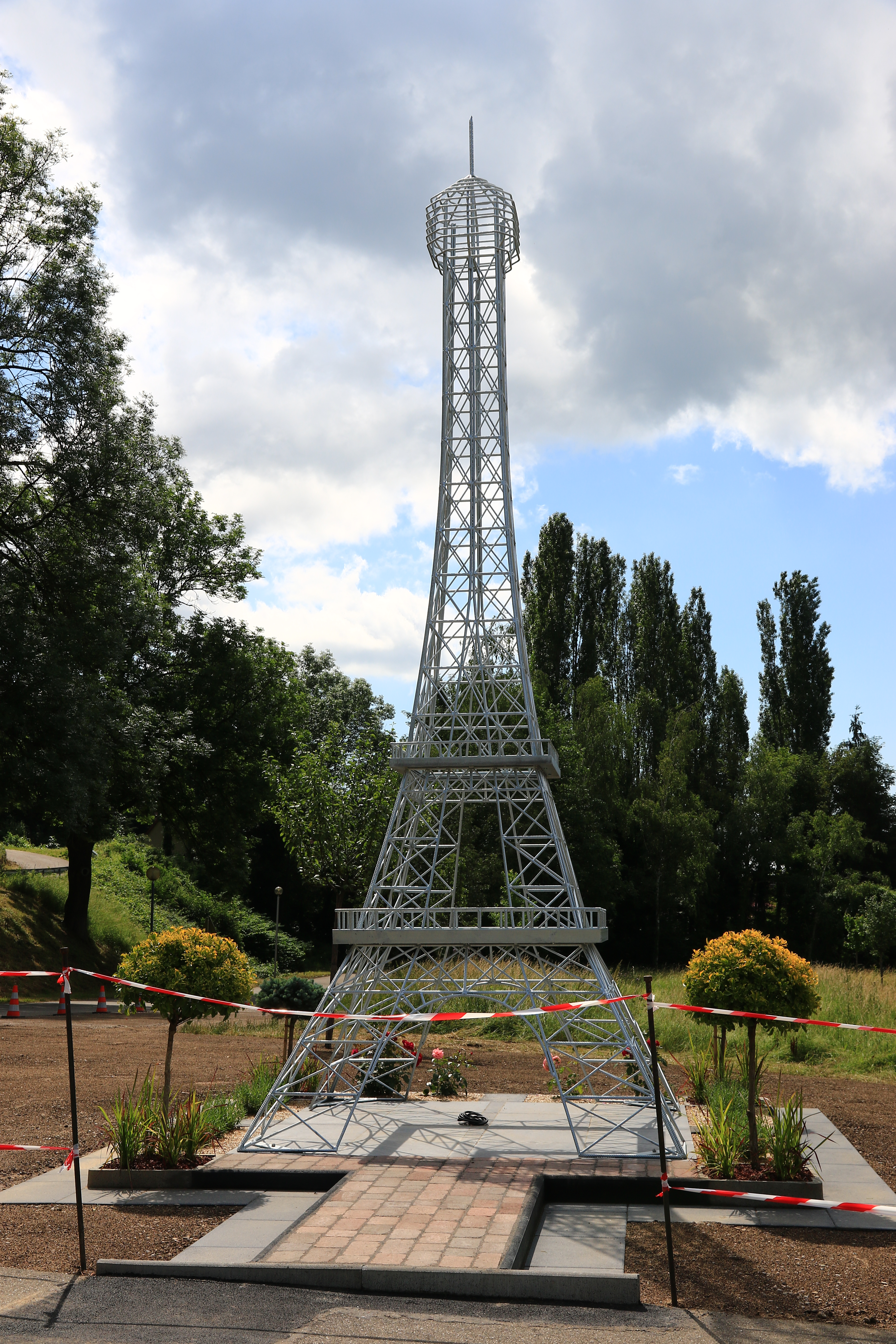 A l'entrée, S-Est du village, se dresse fièrement une copie de la tour Eiffel, dont l'inventeur est né a BUHL